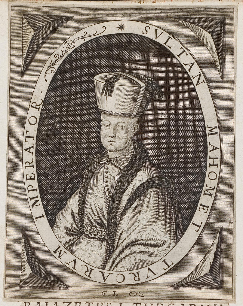 Grafik aus dem Klebeband Nr. 2 der Fürstlich Waldeckschen Hofbibliothek Arolsen Motiv: "Sultan Mahomet Turcarum Imperator" (Mehmed IV.?)